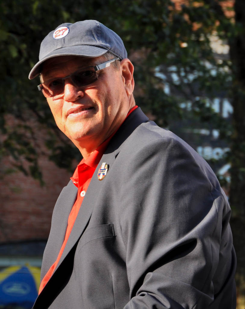 Carlton Fisk